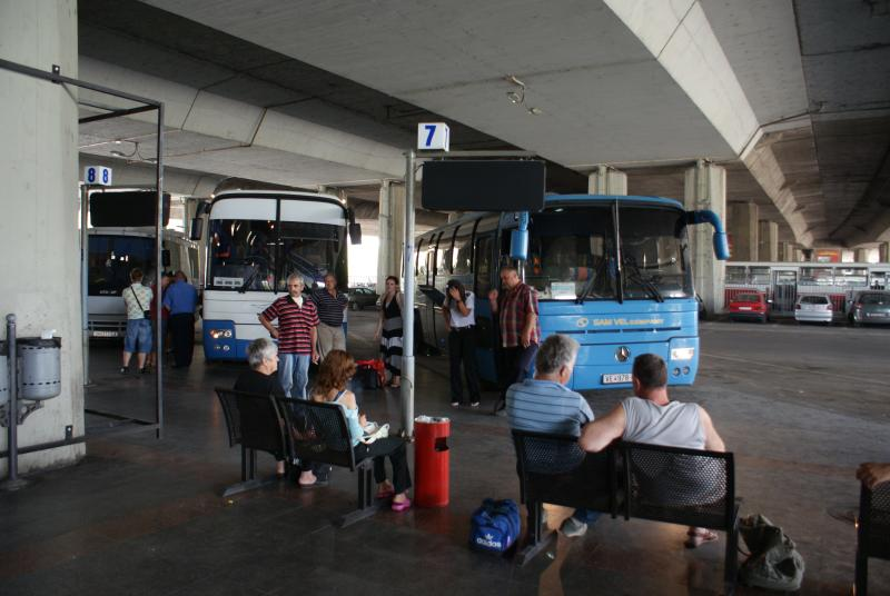 Skopje bus station